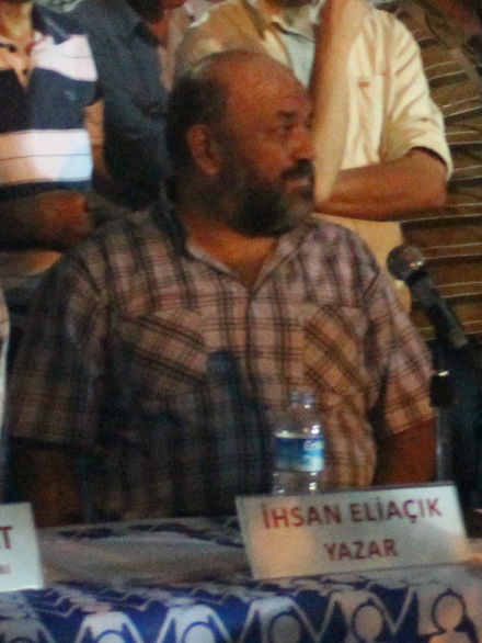 Recep İhsan Eliaçık Ankara Kuğulupark'ta katıldığı forumdan.